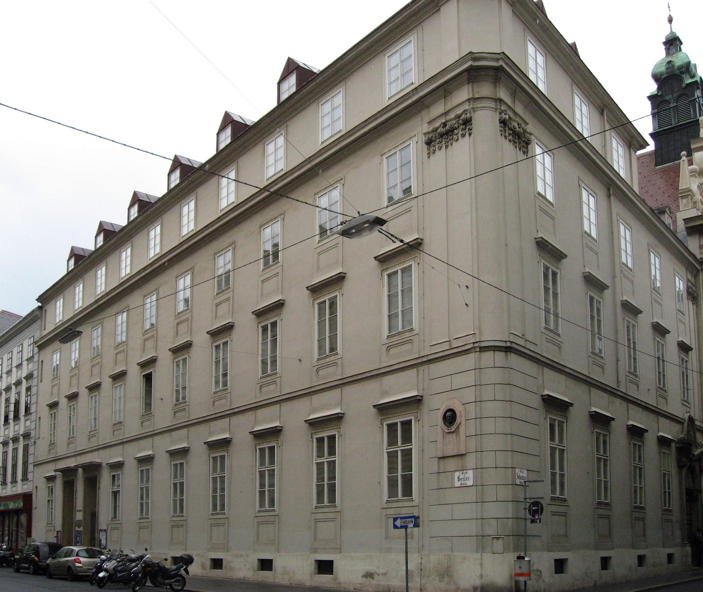 Sankt Ursula, Wien